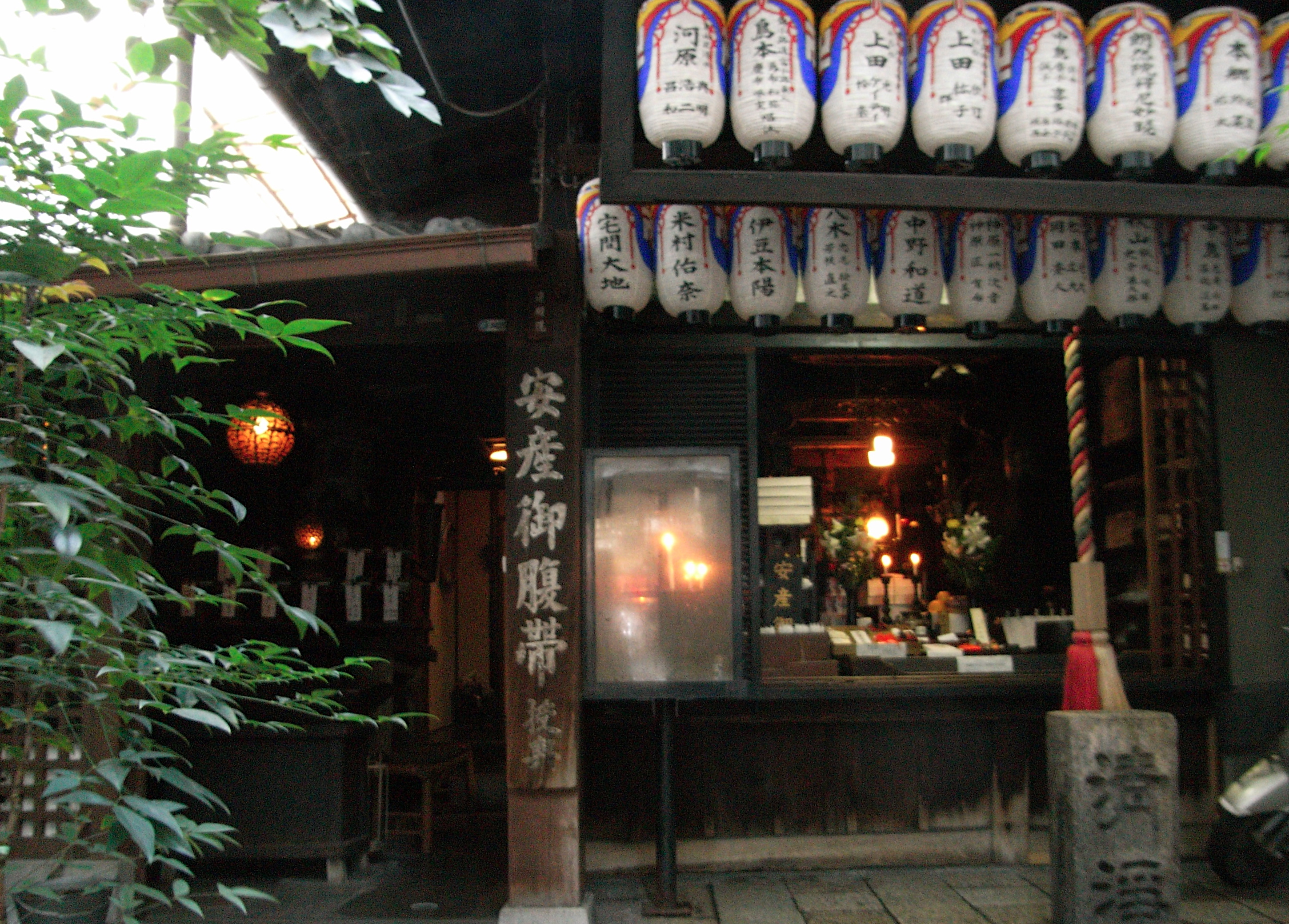 安産守護染殿院